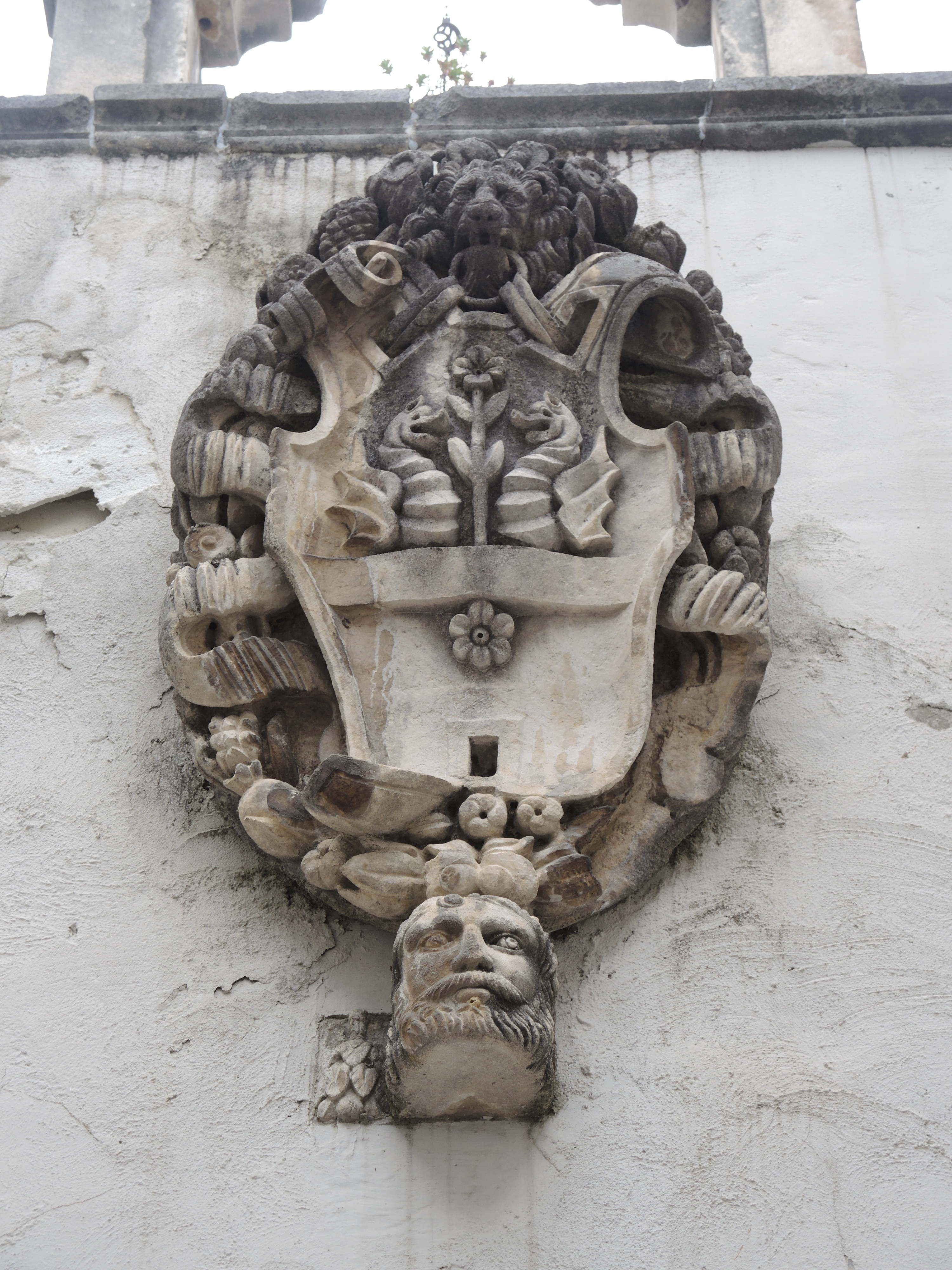 Sulmona: Palazzo Tabassi